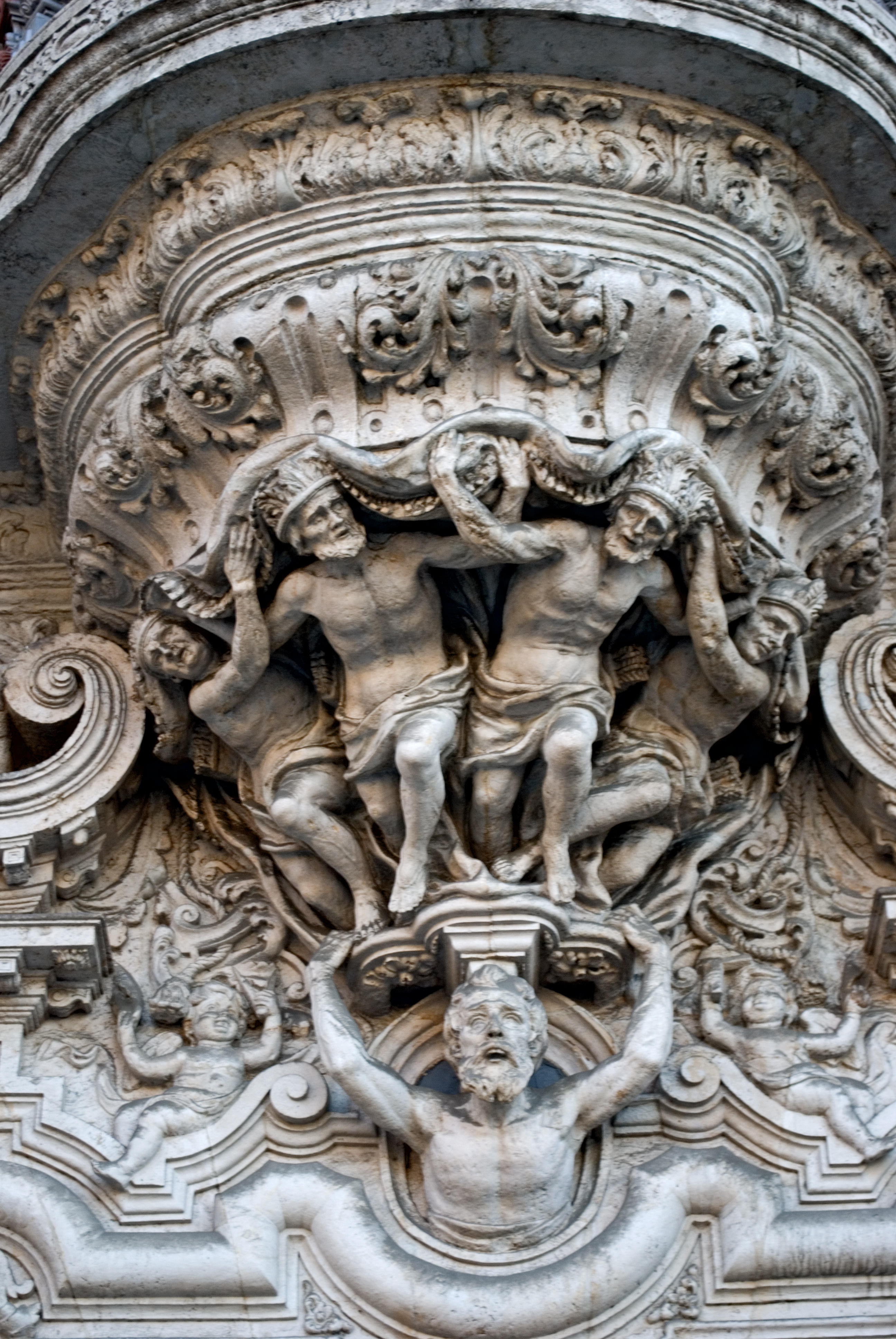 Detalle de la decoración que sostiene el balcón de la portada principal del Palacio de San Telmo, Sevilla